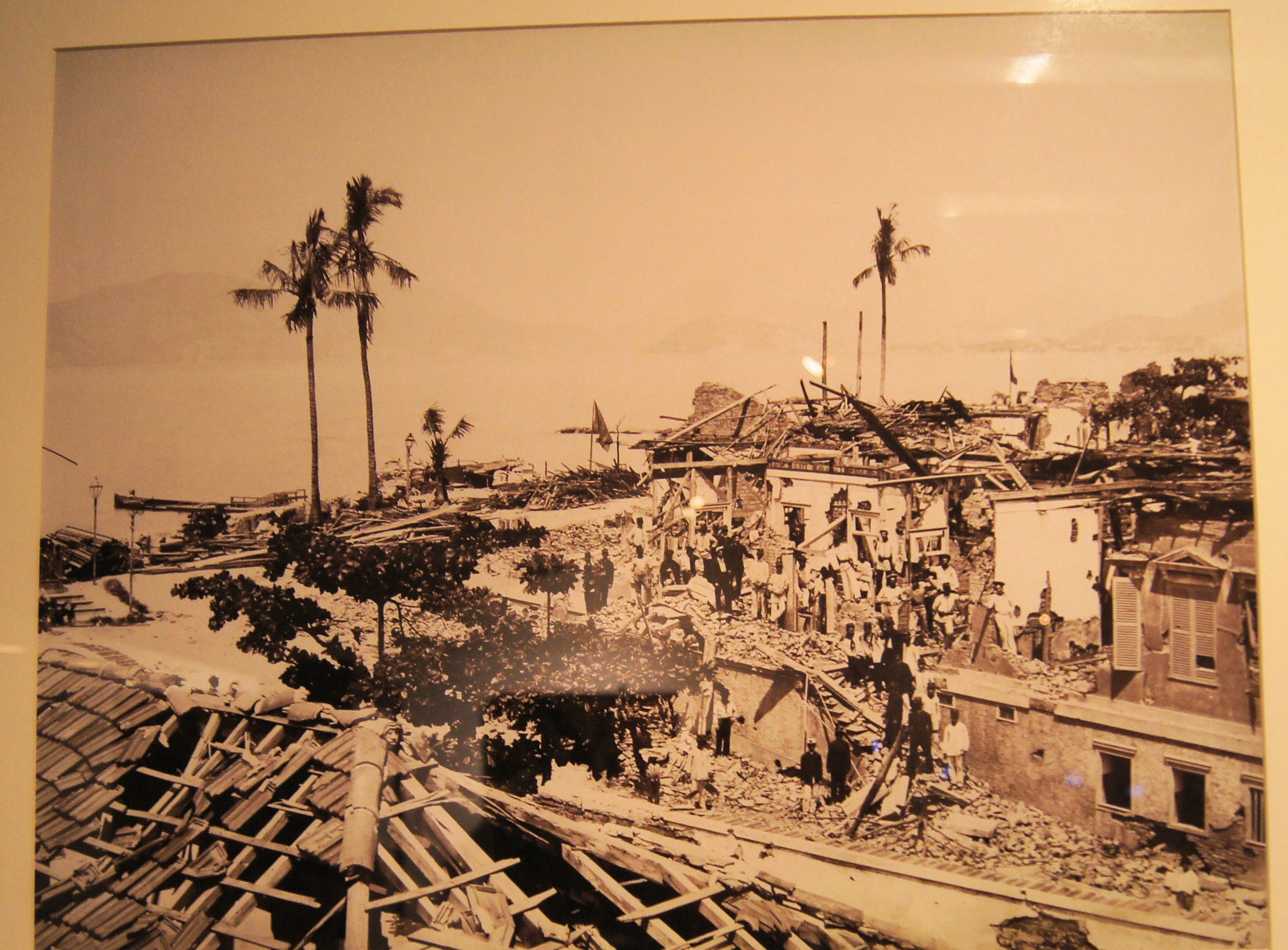 REPRODUÇAÕ FOTOGRÁFICA DAS RUÍNAS DA FORTALEZA DE VILLEGAGNON. REVOLTA DA ARMADA Juan Gutierrez 1854